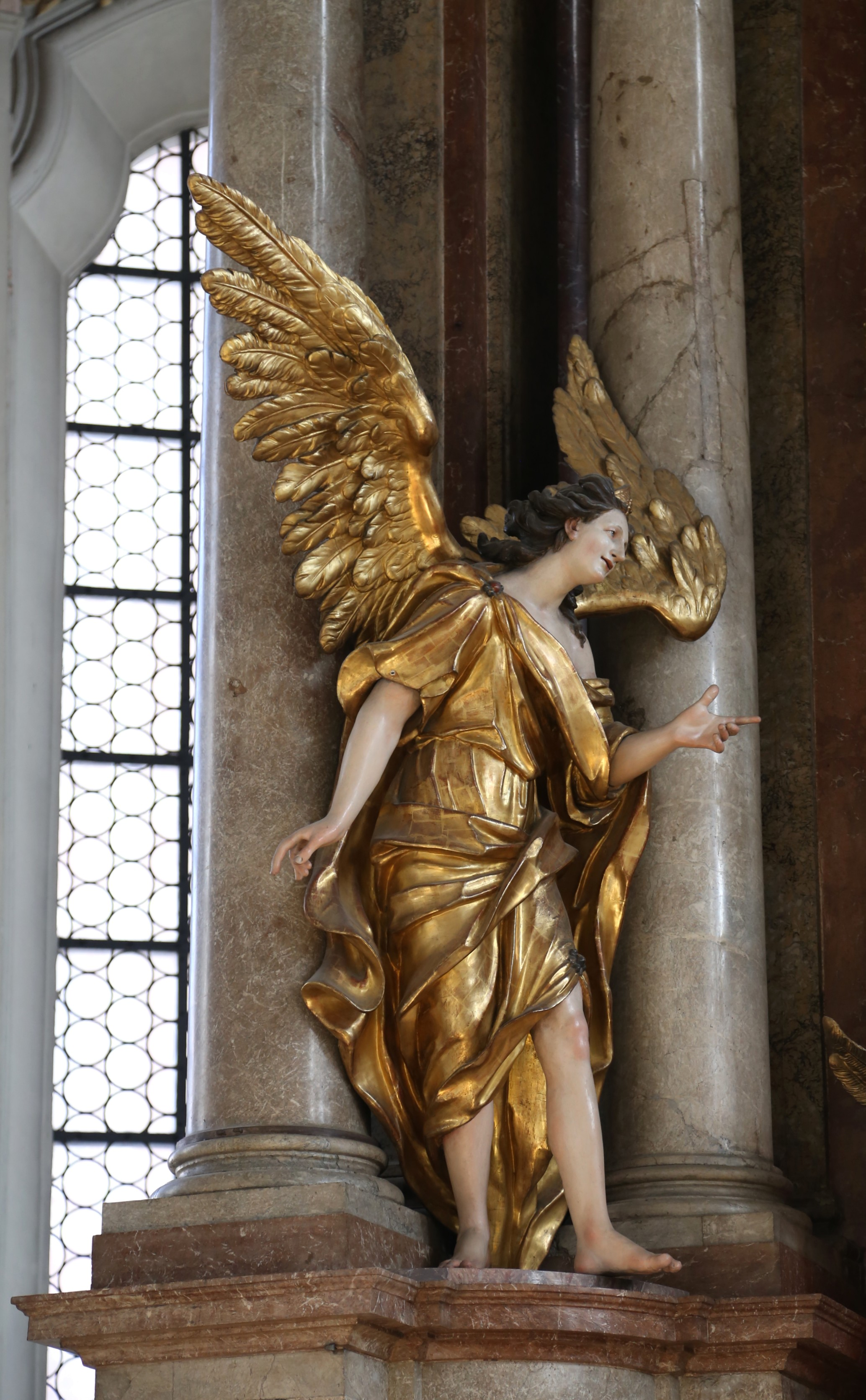 Engelsstatue am Hauptaltar, Heilig-Geist-Kirche, München